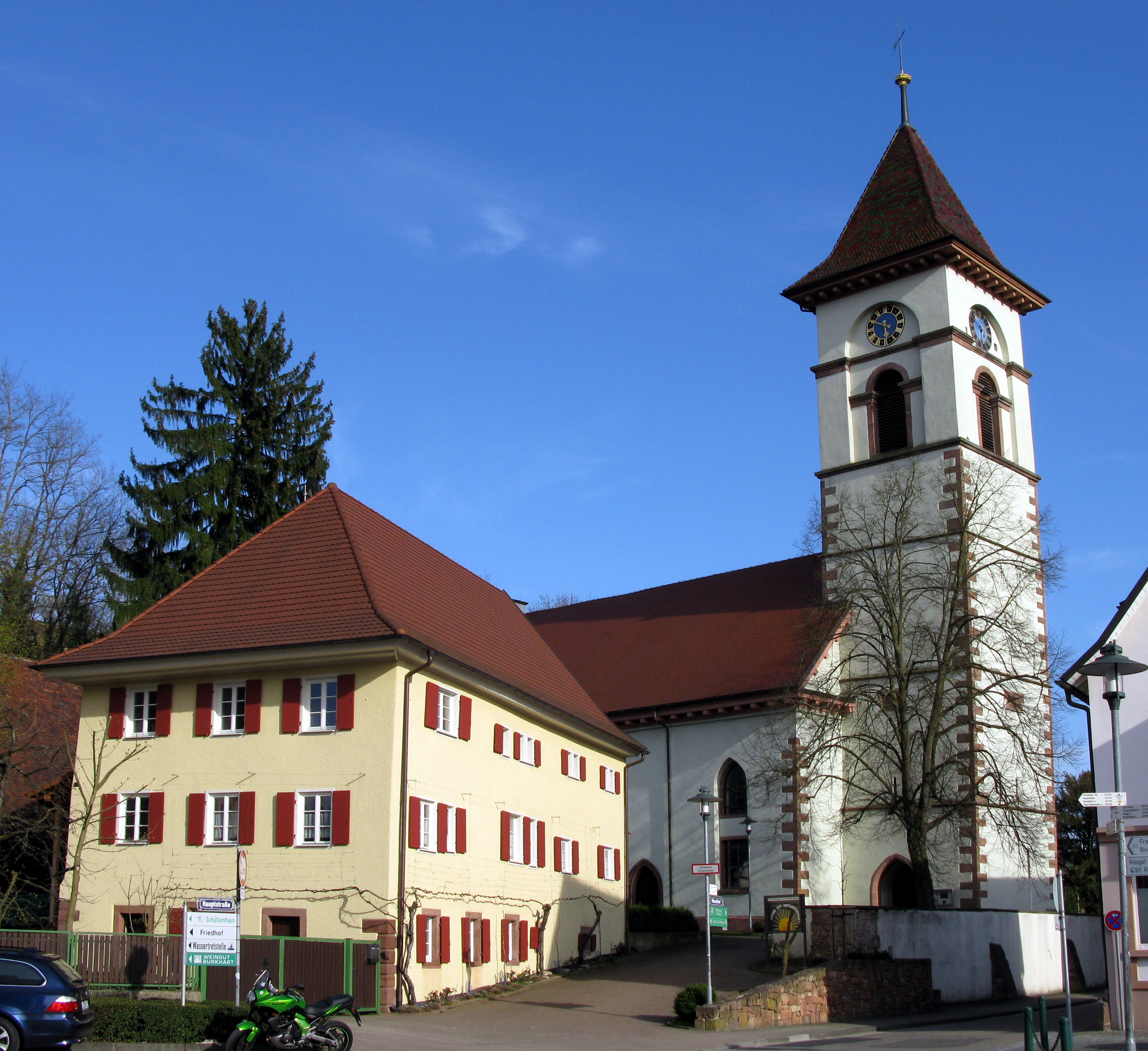 ehemaliger Löwen (links) und Jakobskirche in Malterdingen